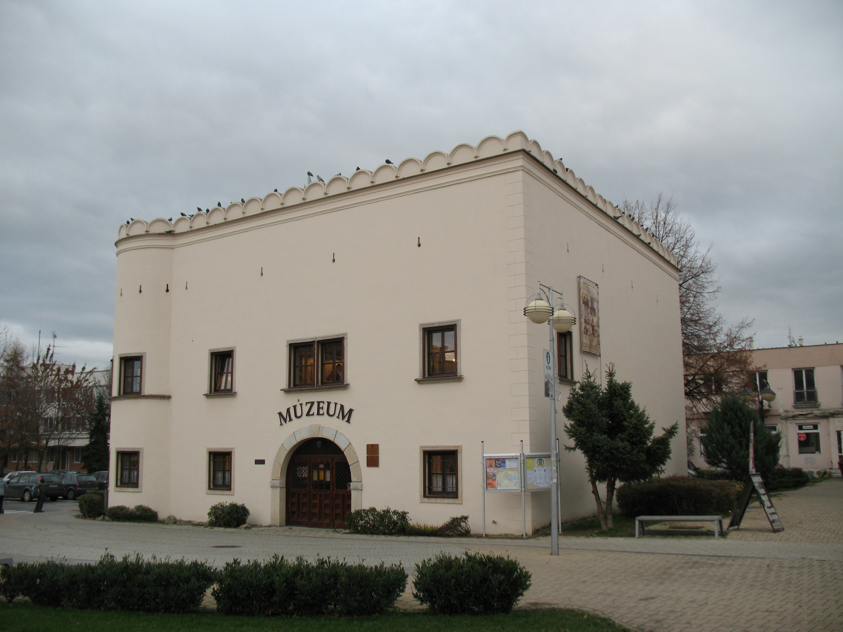 Szenc